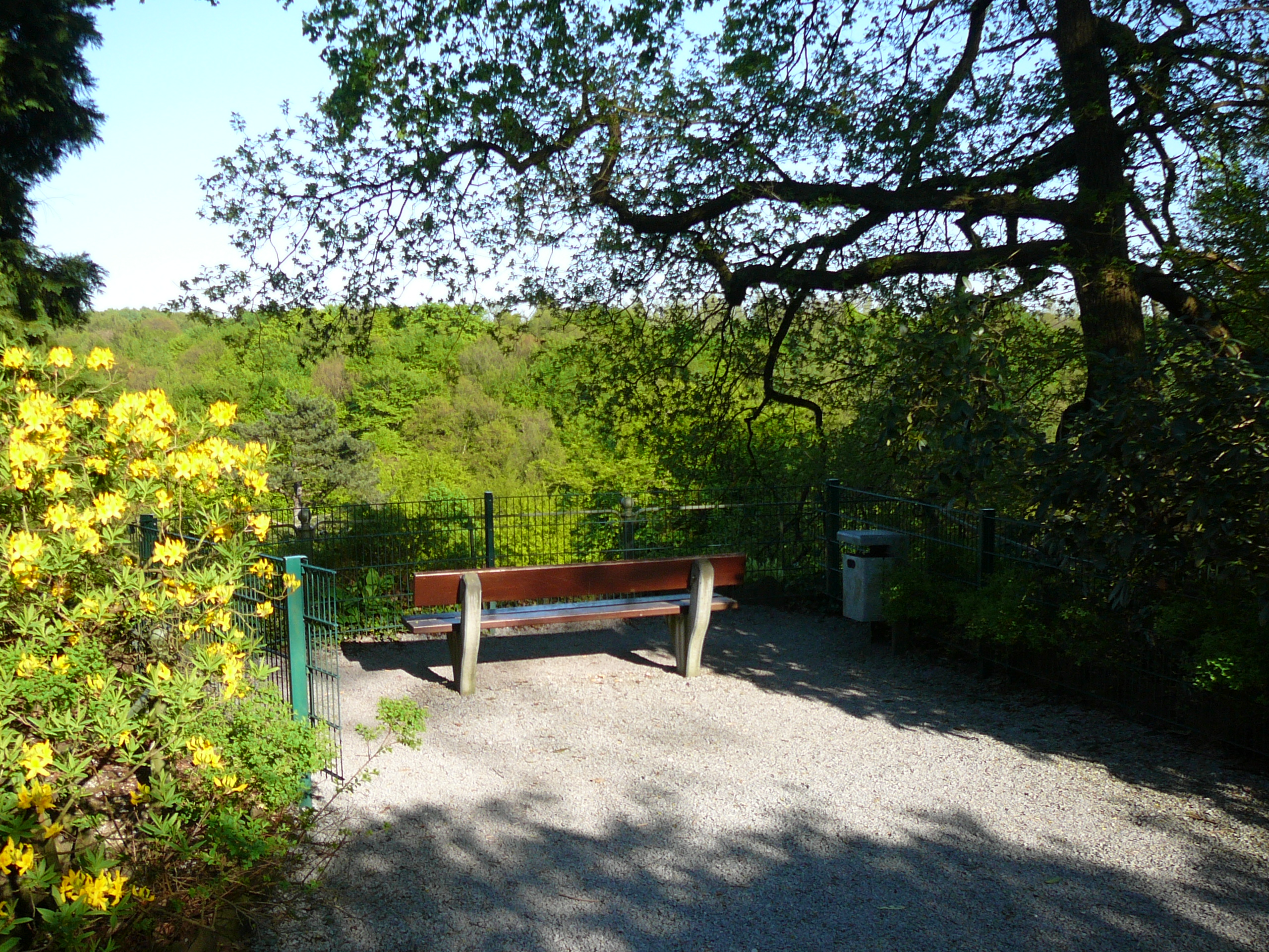 Adolf-Vorwerk-Straße, Wuppertal